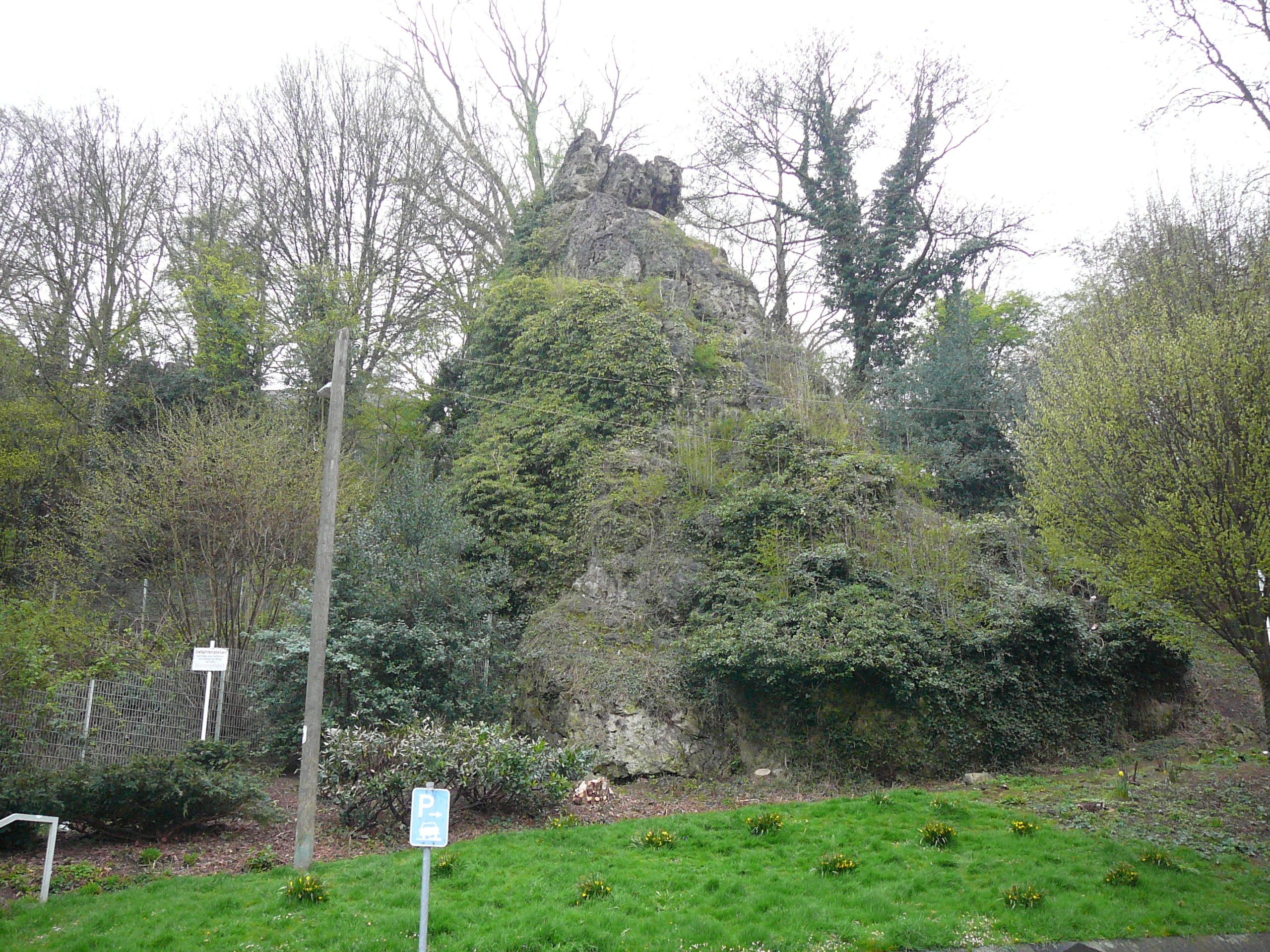 Bogenstraße, Wuppertal